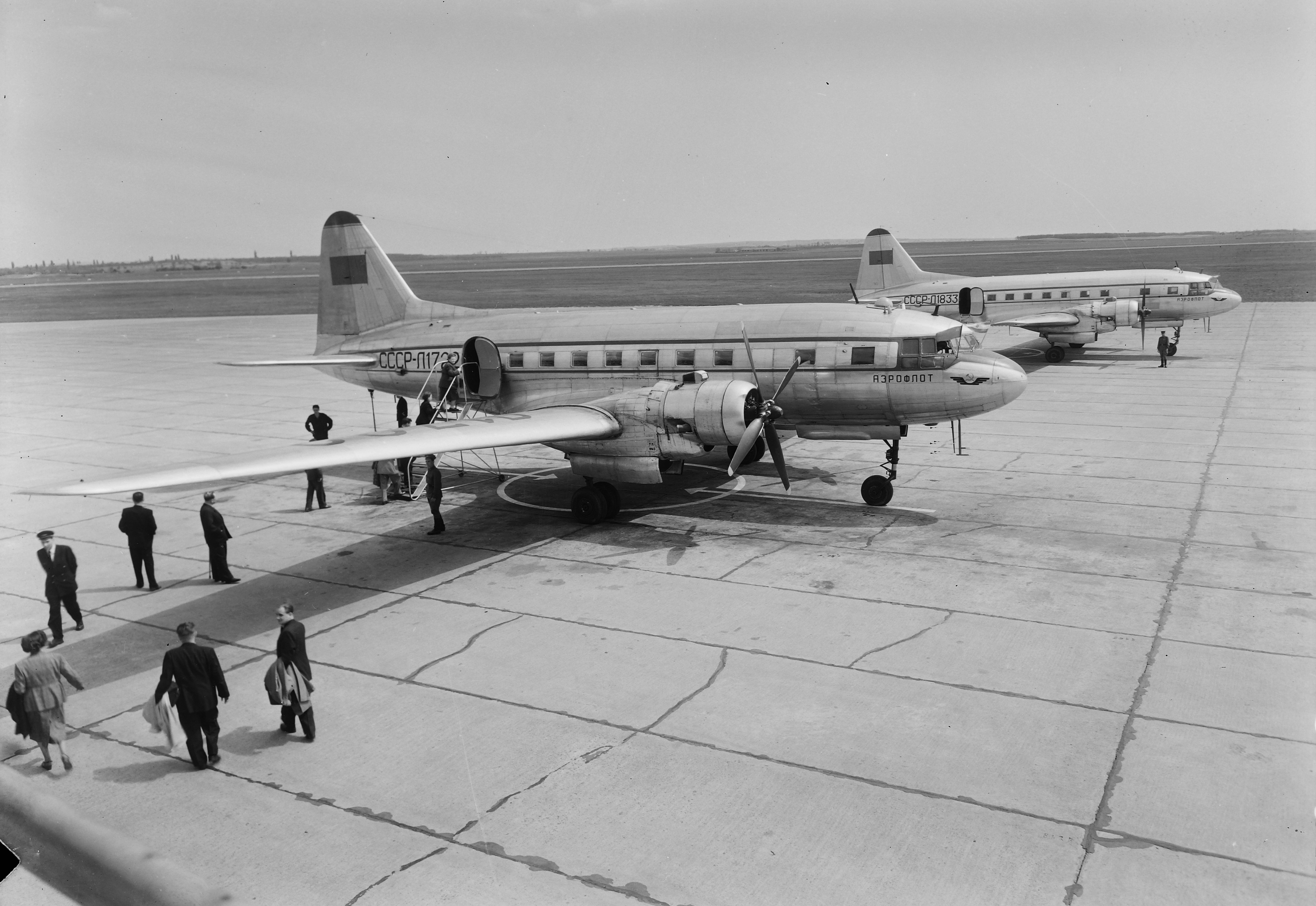 IL-12-es repülőgépek. Location: Hungary, Budapest XVIII. Tags: transport, airplane, Soviet brand, Budapest Title: IL-12-es repülőgépek.